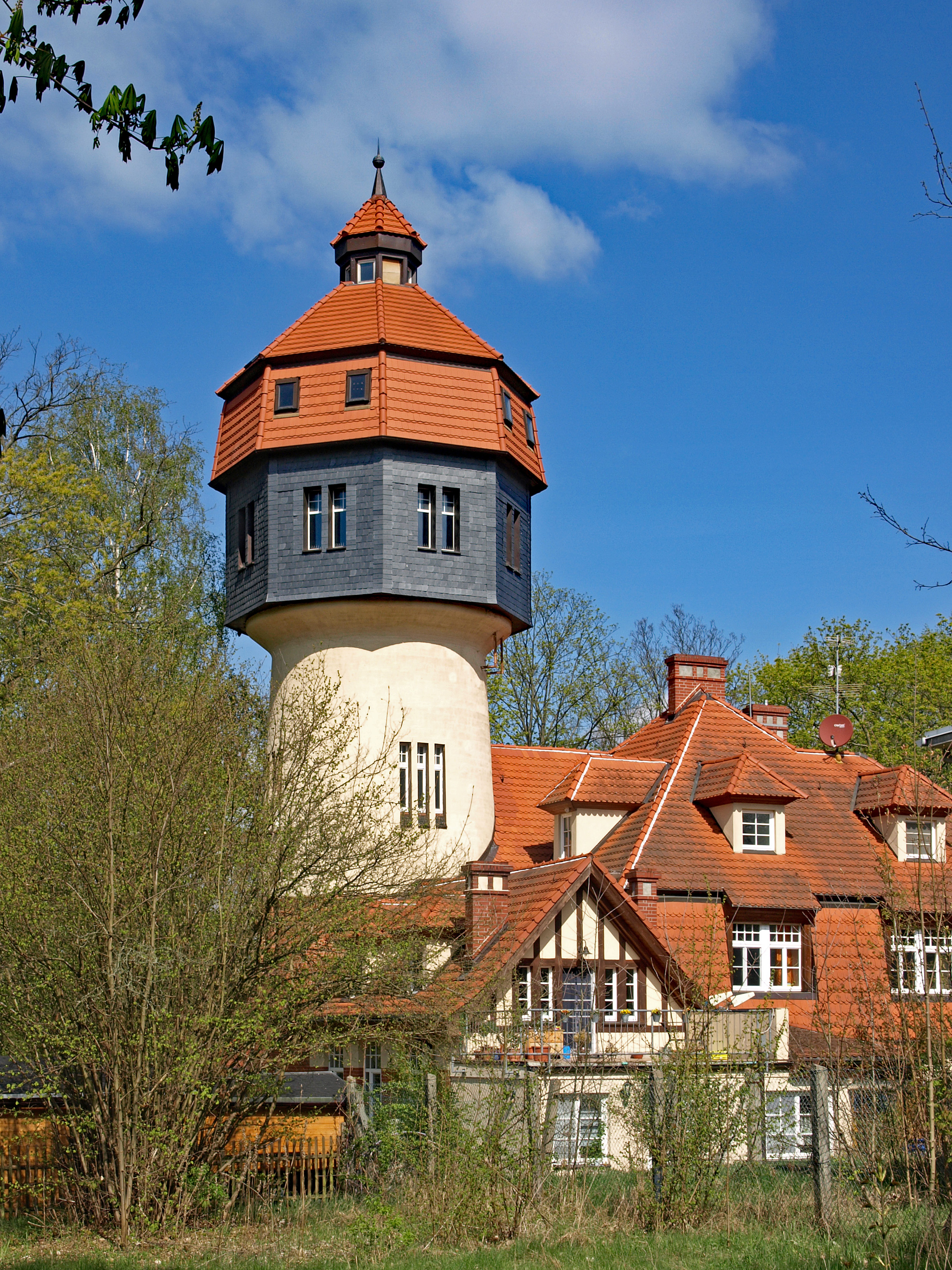 Wasserturm mit Wärterwohnhaus und Pumpstation in Rehagen